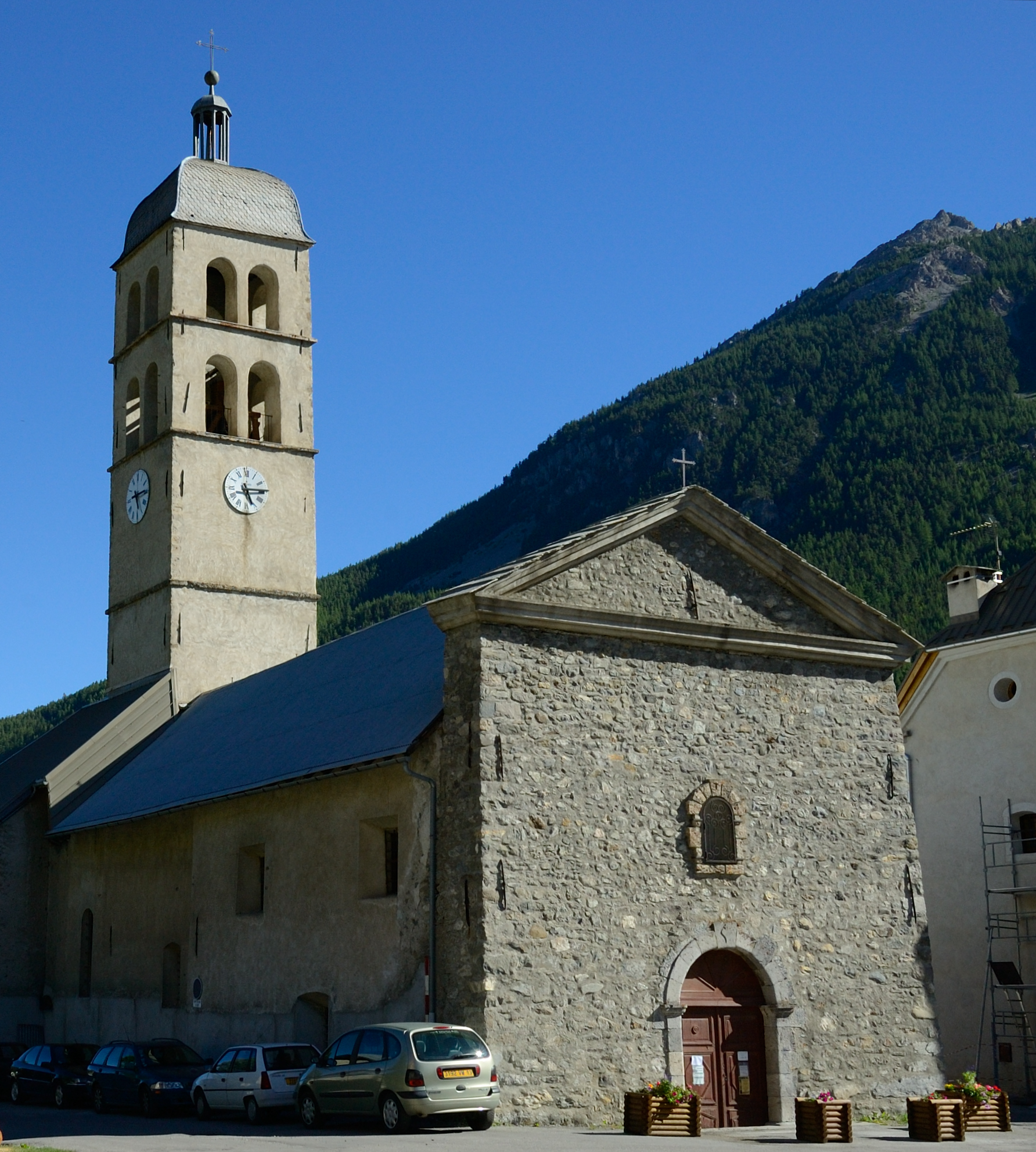 Église des Guibertes, Le Monêtier-les-Bains (Hautes-Alpes)